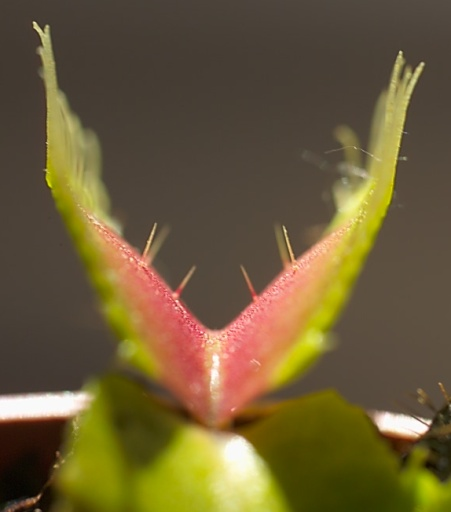 Dionaea muscipula : piège